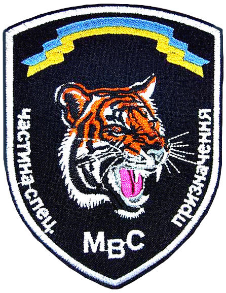 Нарукавная нашивка 47-й полка специального назначения Крымского территориального командования внутренних войск МВД Украины "Тигр" (в/ч 4125).